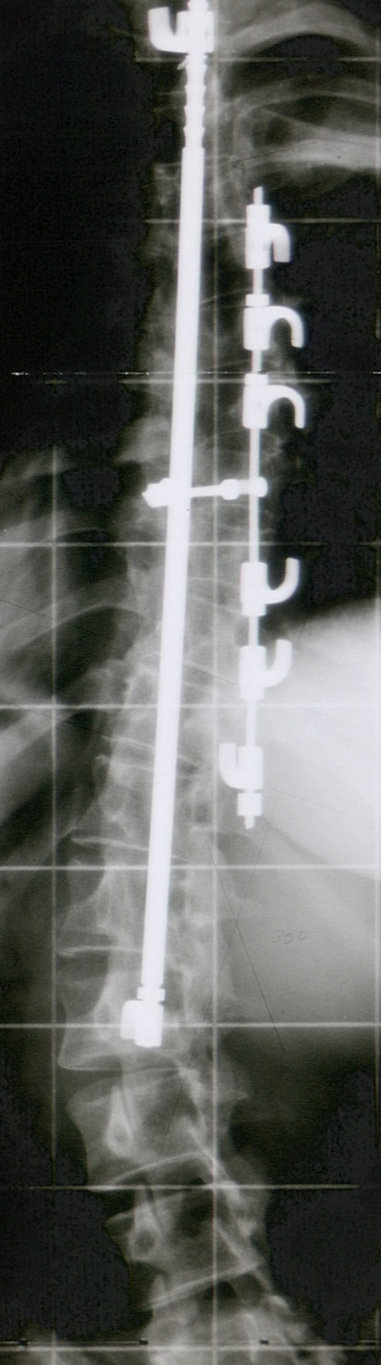 Skoliose der Brustwirbelsäule, korrigiert durch Distraktionsspondylodese mit Harrington-Stab